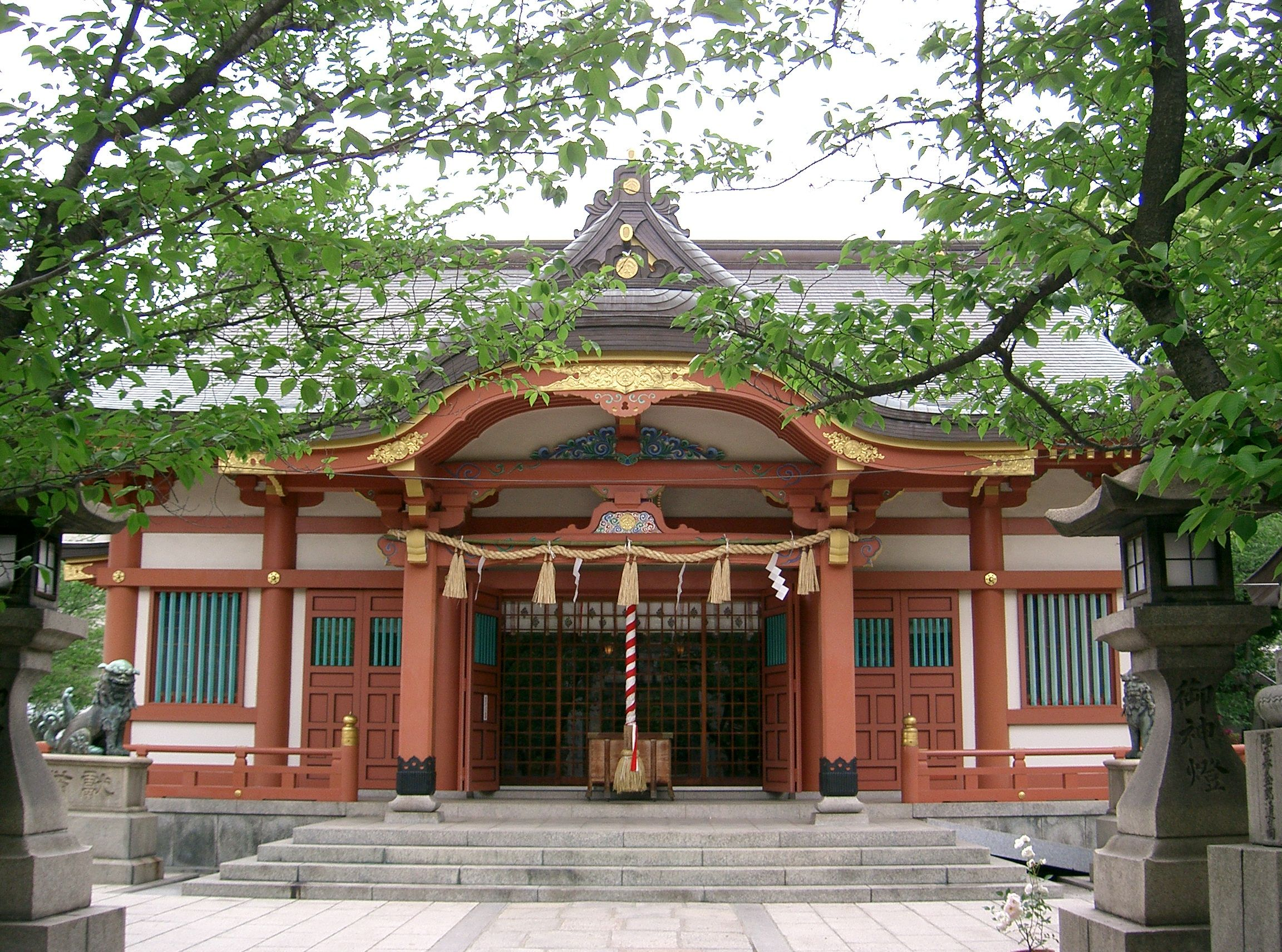 土佐稲荷神社 拝殿